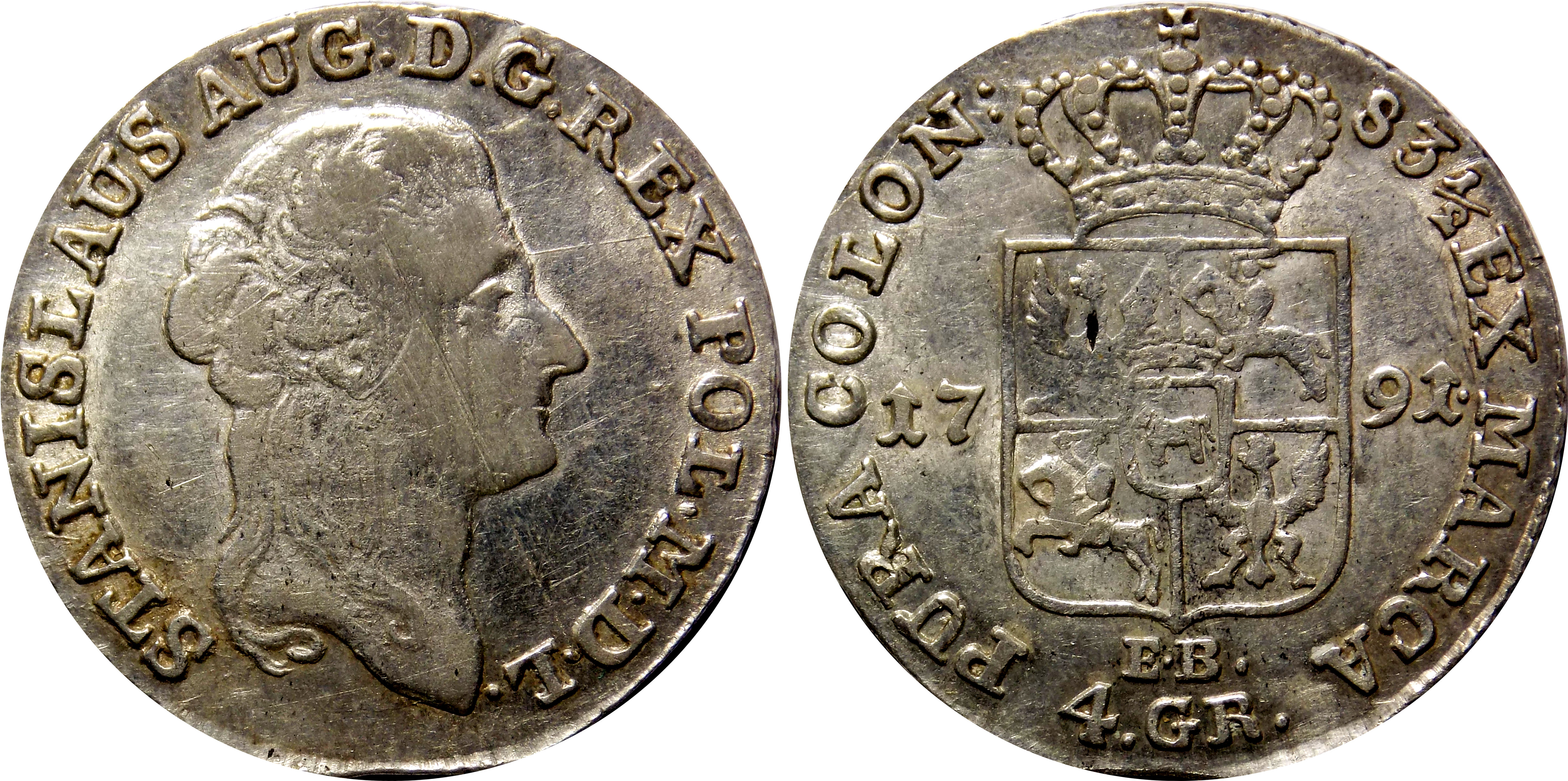 Złotówka koronna 1791